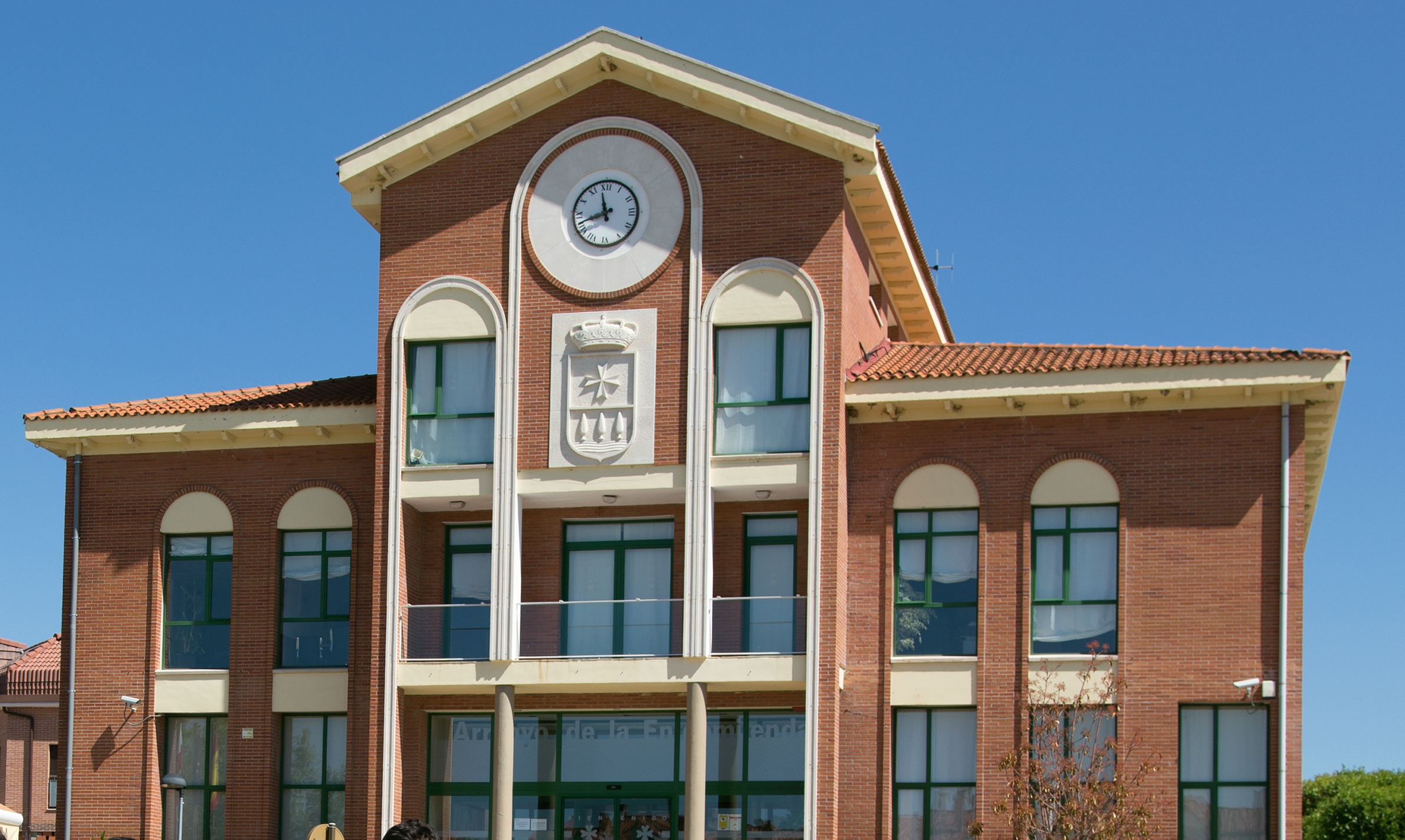 Fotografía: Ángel Cantero / 22-6-2013